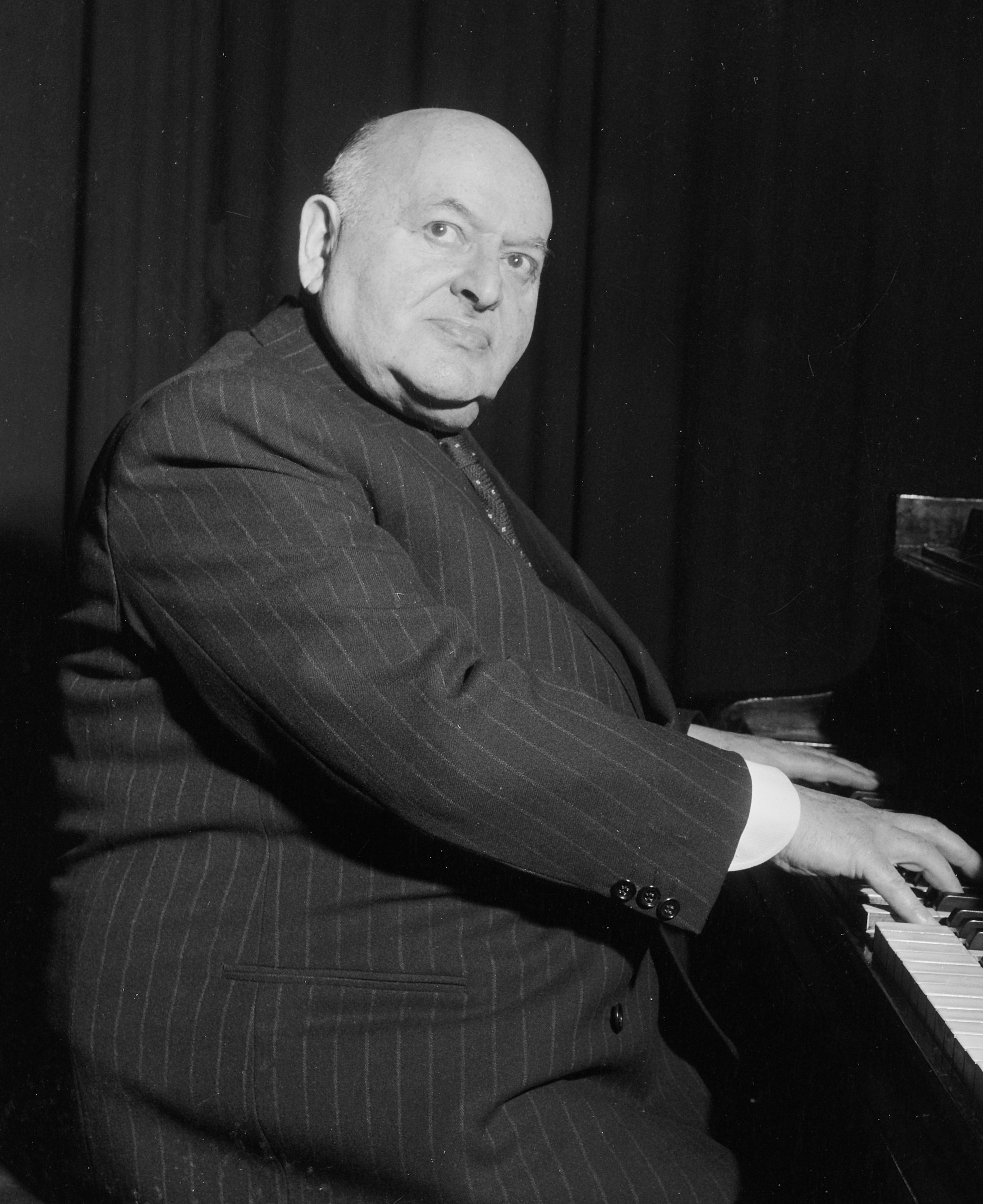 Grammofoonplaatopname van Cabaret Nelson: Rudolf Nelson